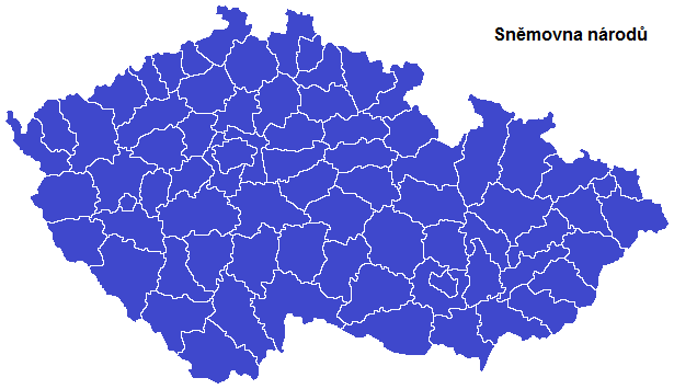 Volby do Sněmovny národů Federálního shromáždění v roce 1992 - vítězné strany podle okresů (modrá Koalice ODS a KDS)